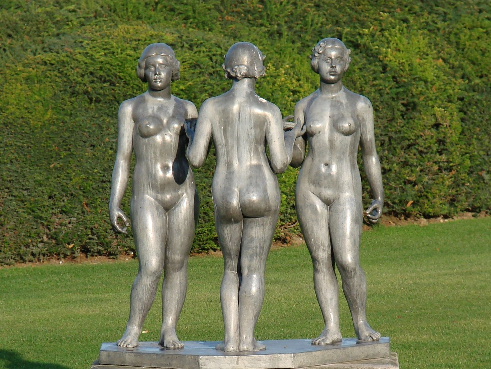 au jardin des Tuileries à Paris.